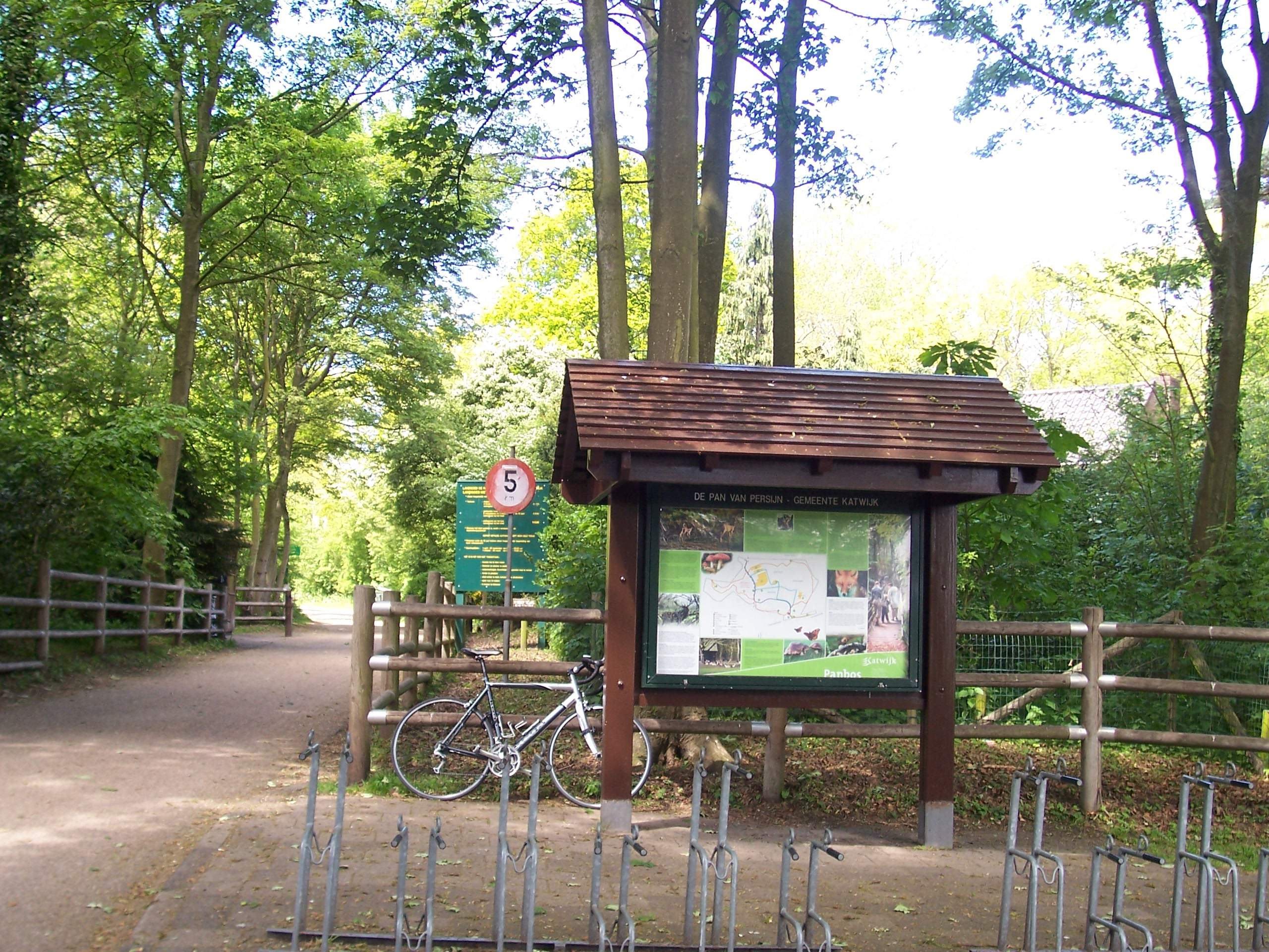 Informatiebord bij ingang 'Pan van Persijn' (Panbos) aan de Wassenaarsweg te Katwijk